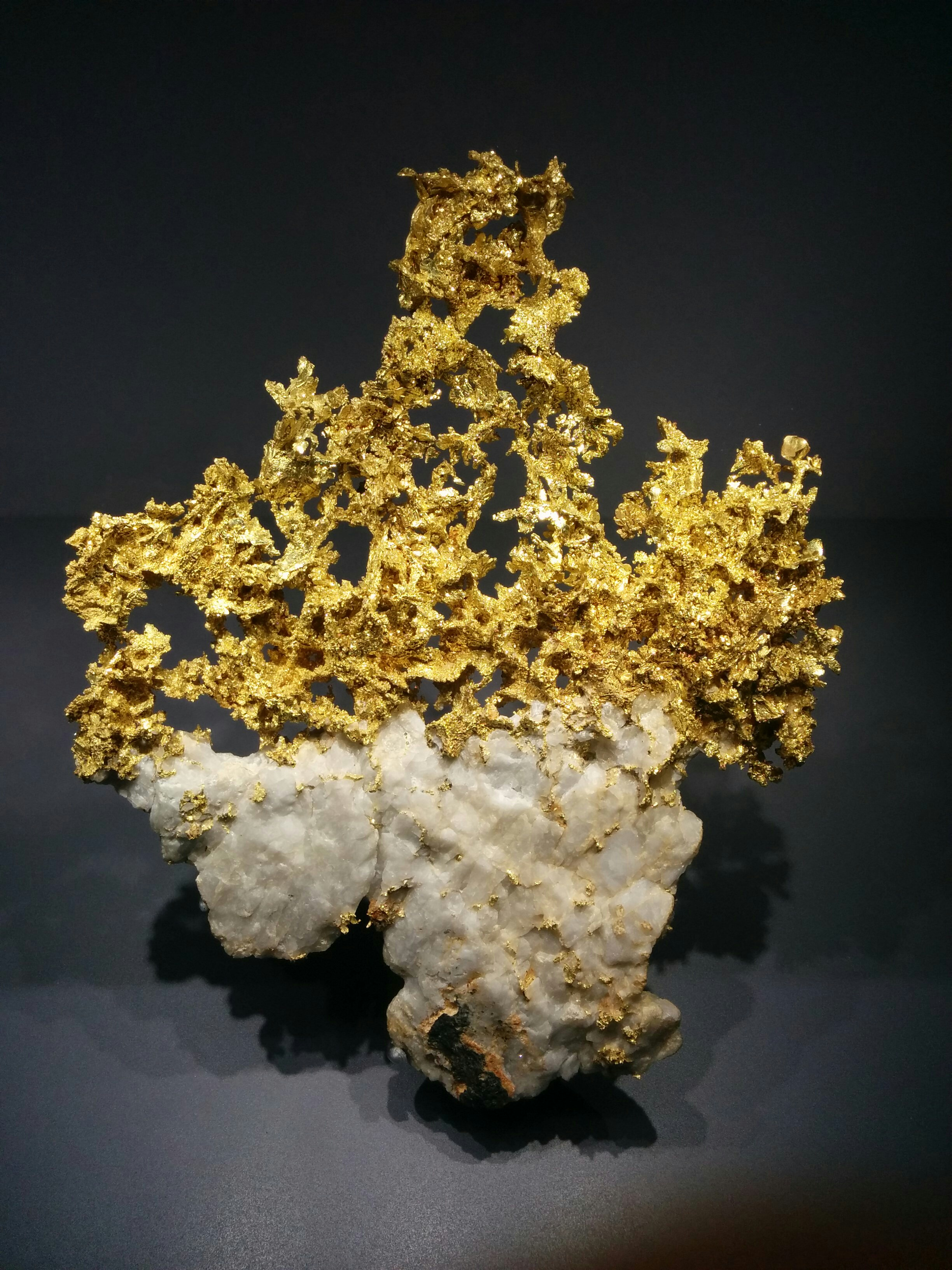 Or natif et quartz de Californie (Etats-Unis), à la Galerie de Minéralogie de Paris.